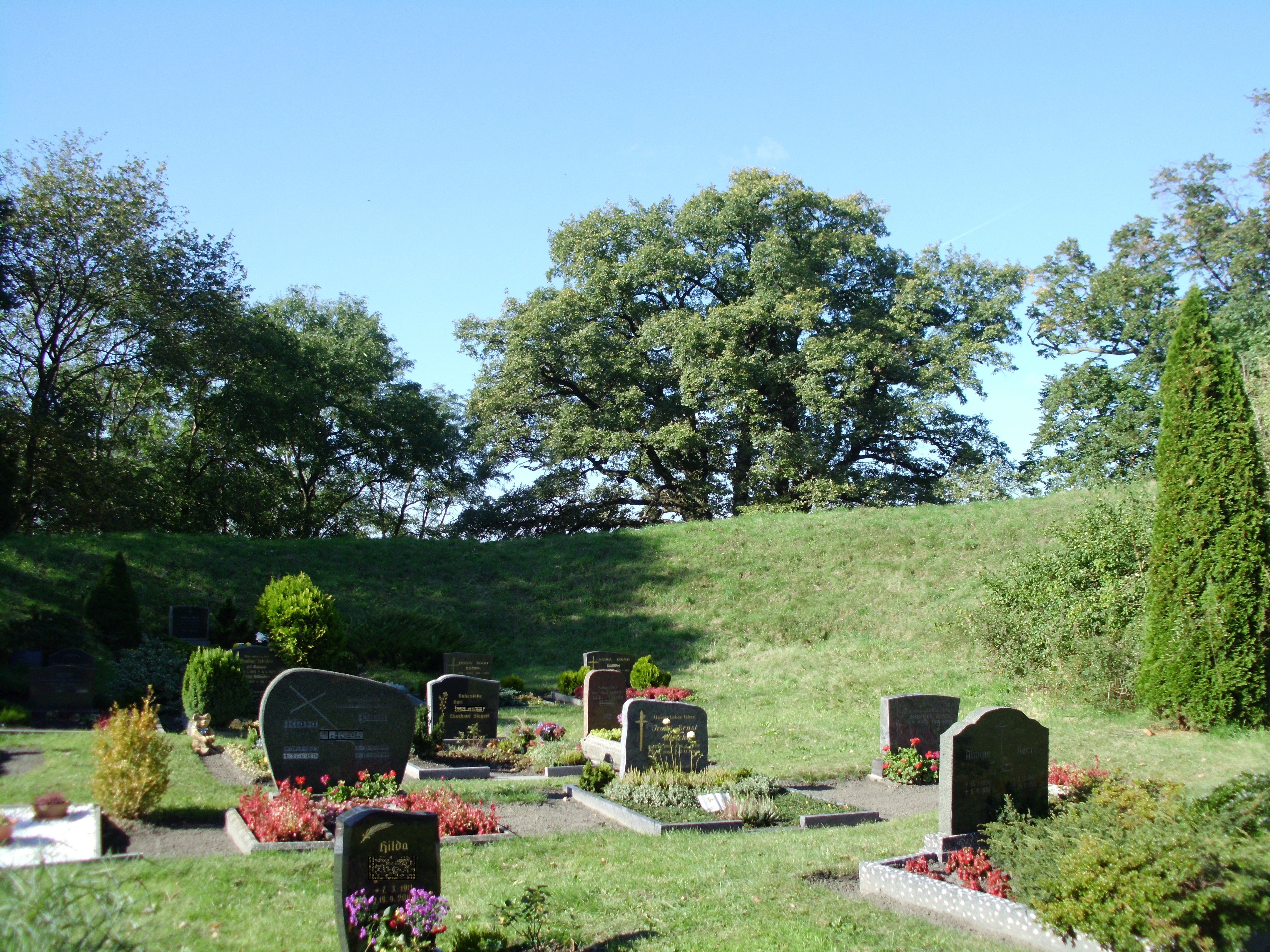 Reste des slawischen Burgwalls ("Schwedenschanze") in Buckow, bei Rietz-Neuendorf, Brandenburg, Germany